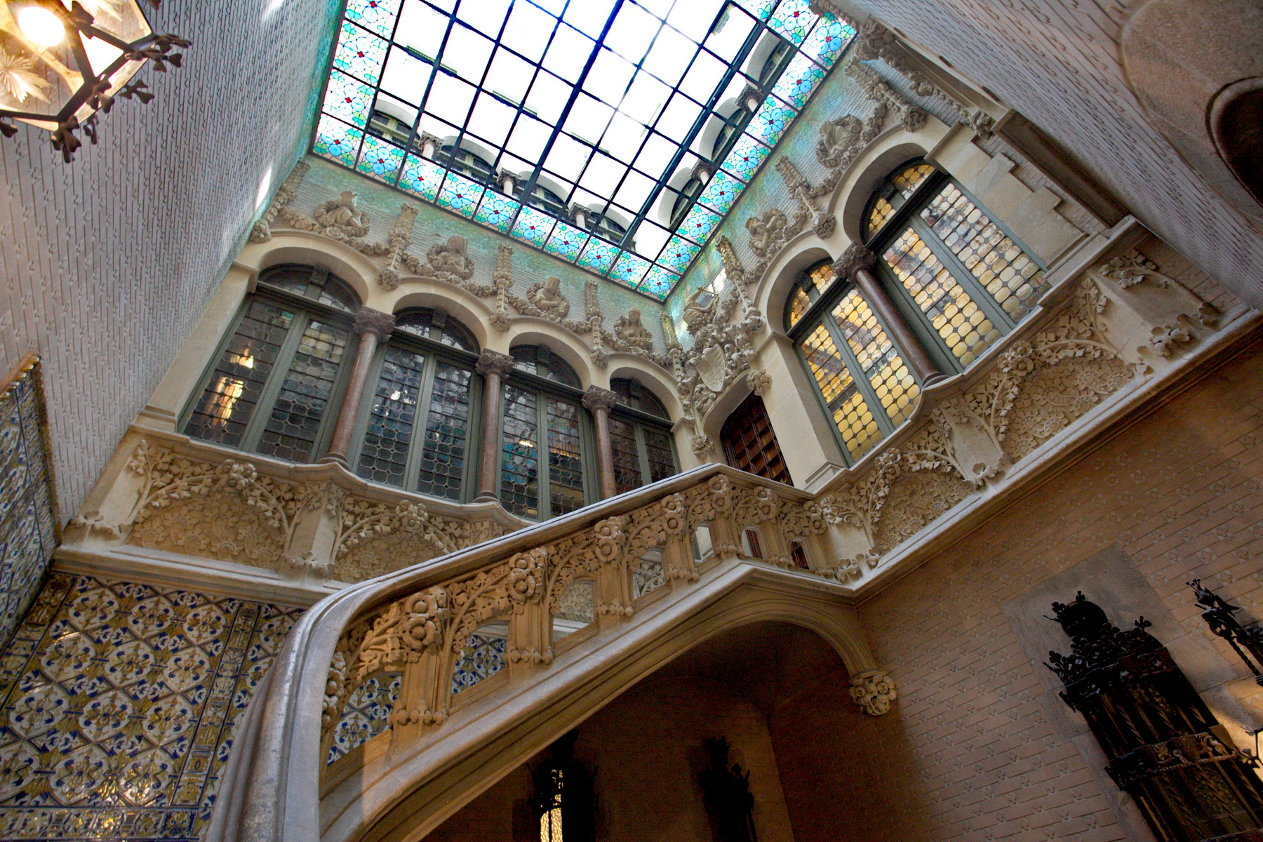 Palau del Baró de Quadras (Barcelona)